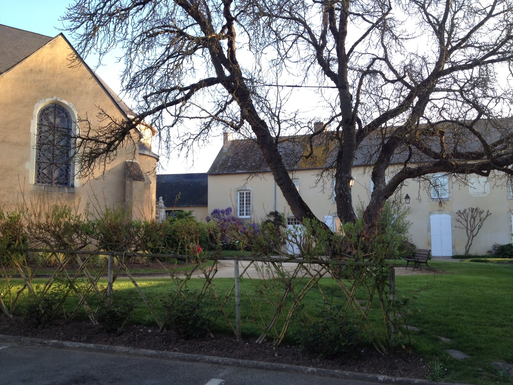 Spay - Église et presbytère